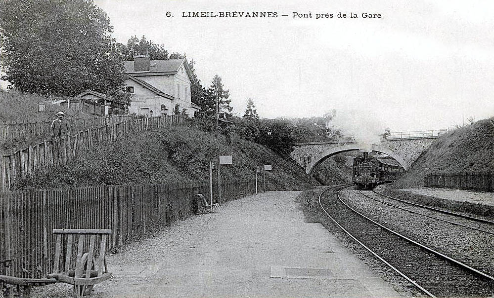 La gare de Limeil-Brévannes, Val-de-Marne, France.